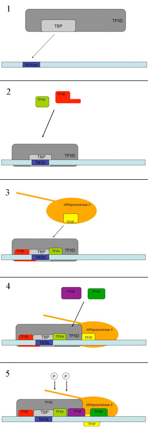 Il y a mise en place des différents facteurs généraux de transcription nécessaire à l'initiation de la transcription des gènes de classe 2 par l'ARN polymérase II, chez les eucaryotes.